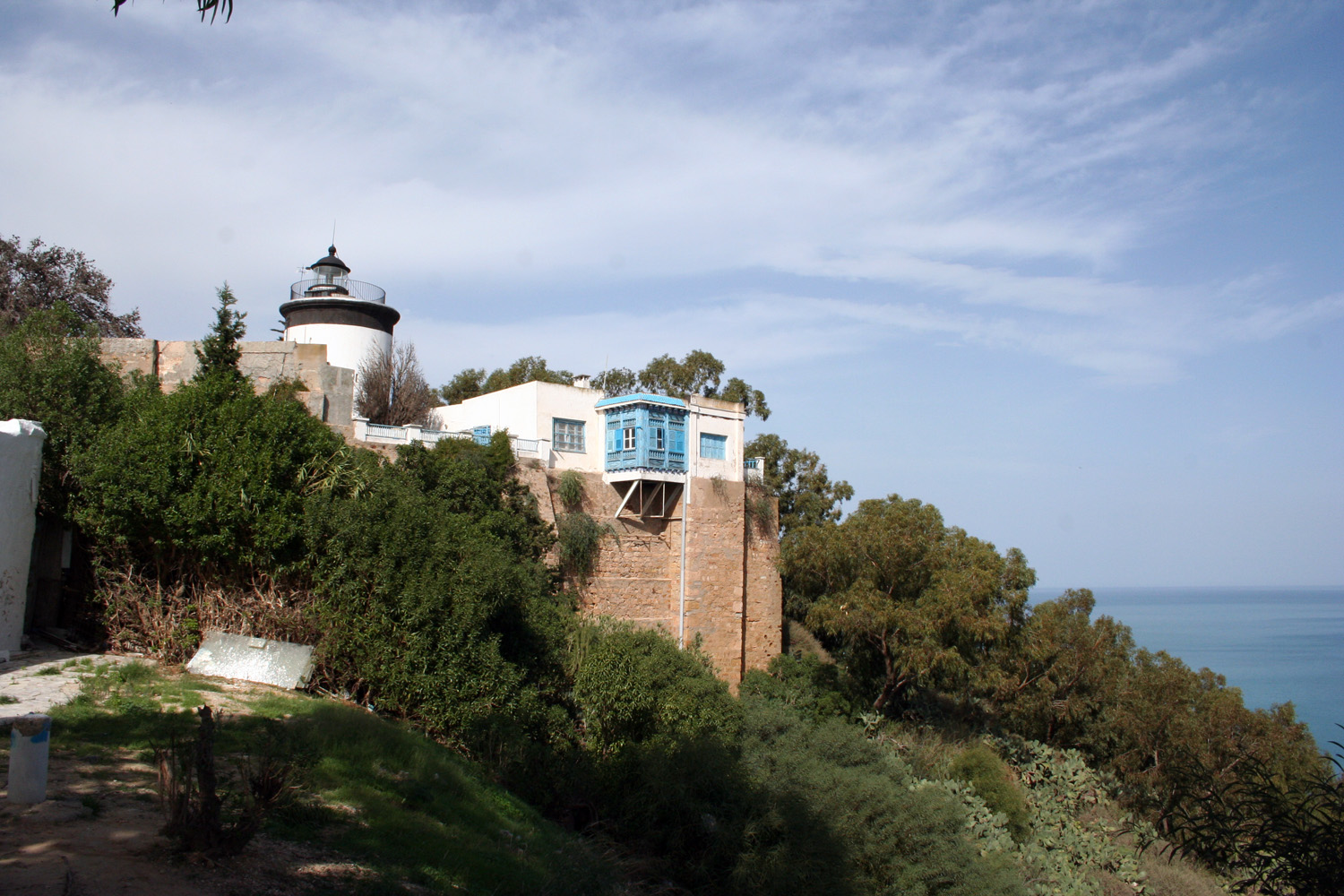 Phare de Sidi Bou Saïd en Tunisie